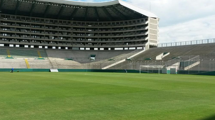 Vista